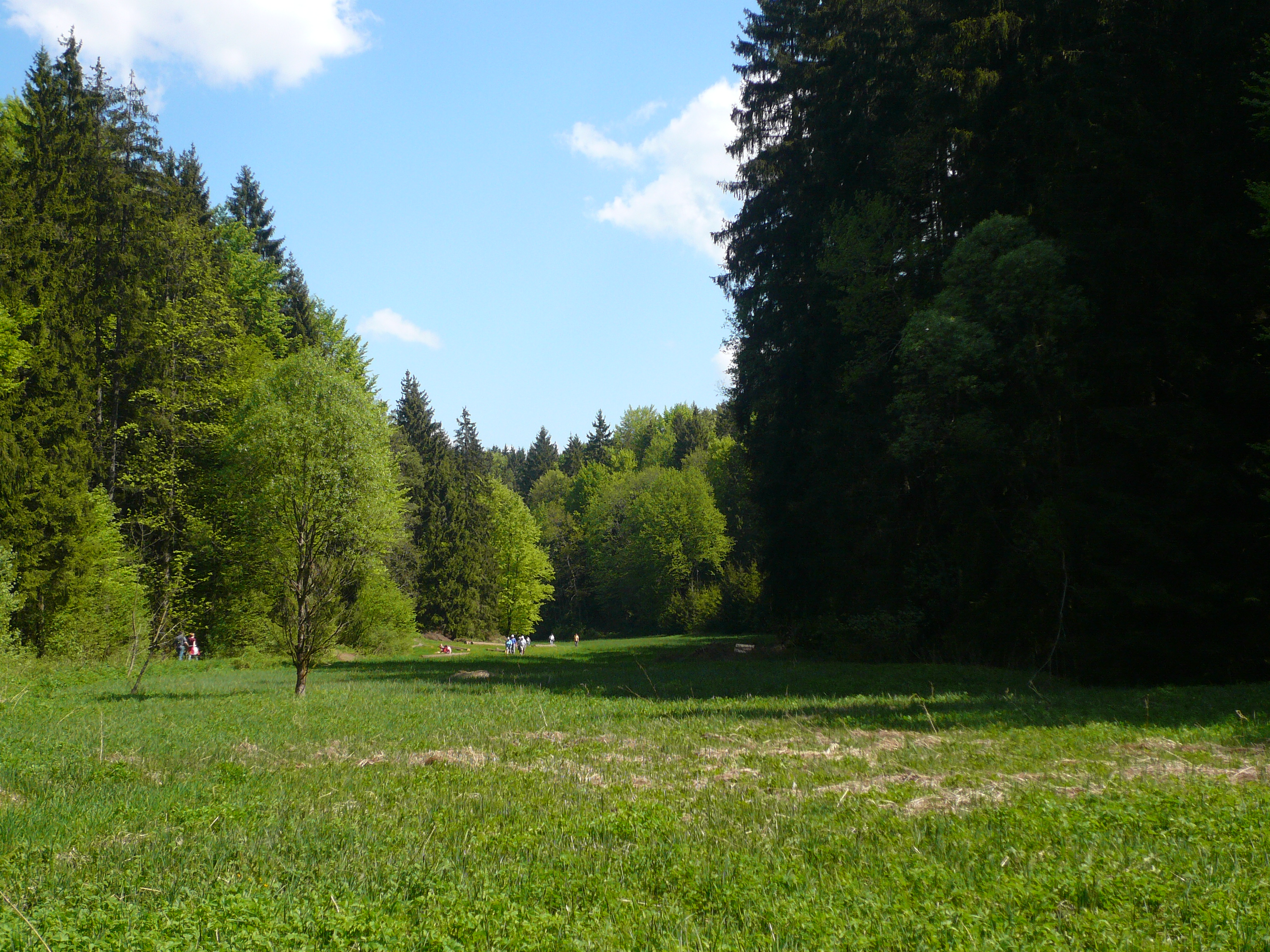 Blick ins Paradiestal